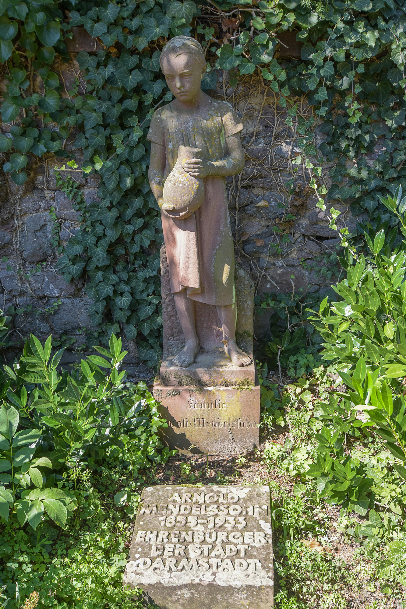 Grabmal für Arnold Mendelsohn im Bessunger Friedhof, Darmstadt, Heinrichswingertsweg 63, Grabmal Mauer 33